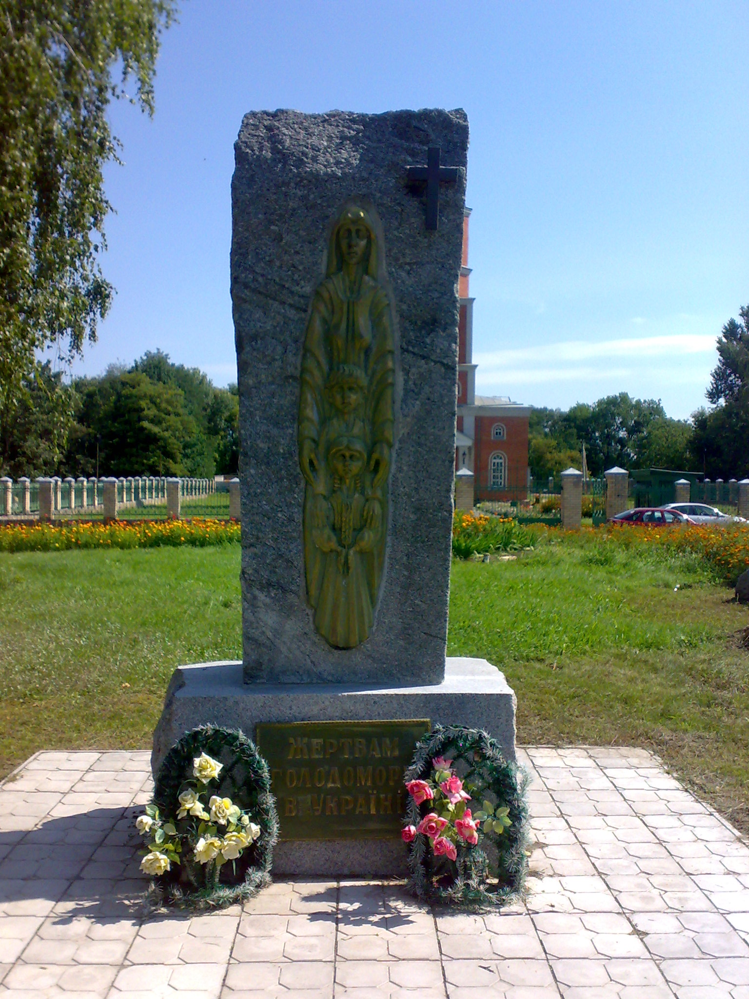 Пам'ятник жертвам Голодомору в Миронівці